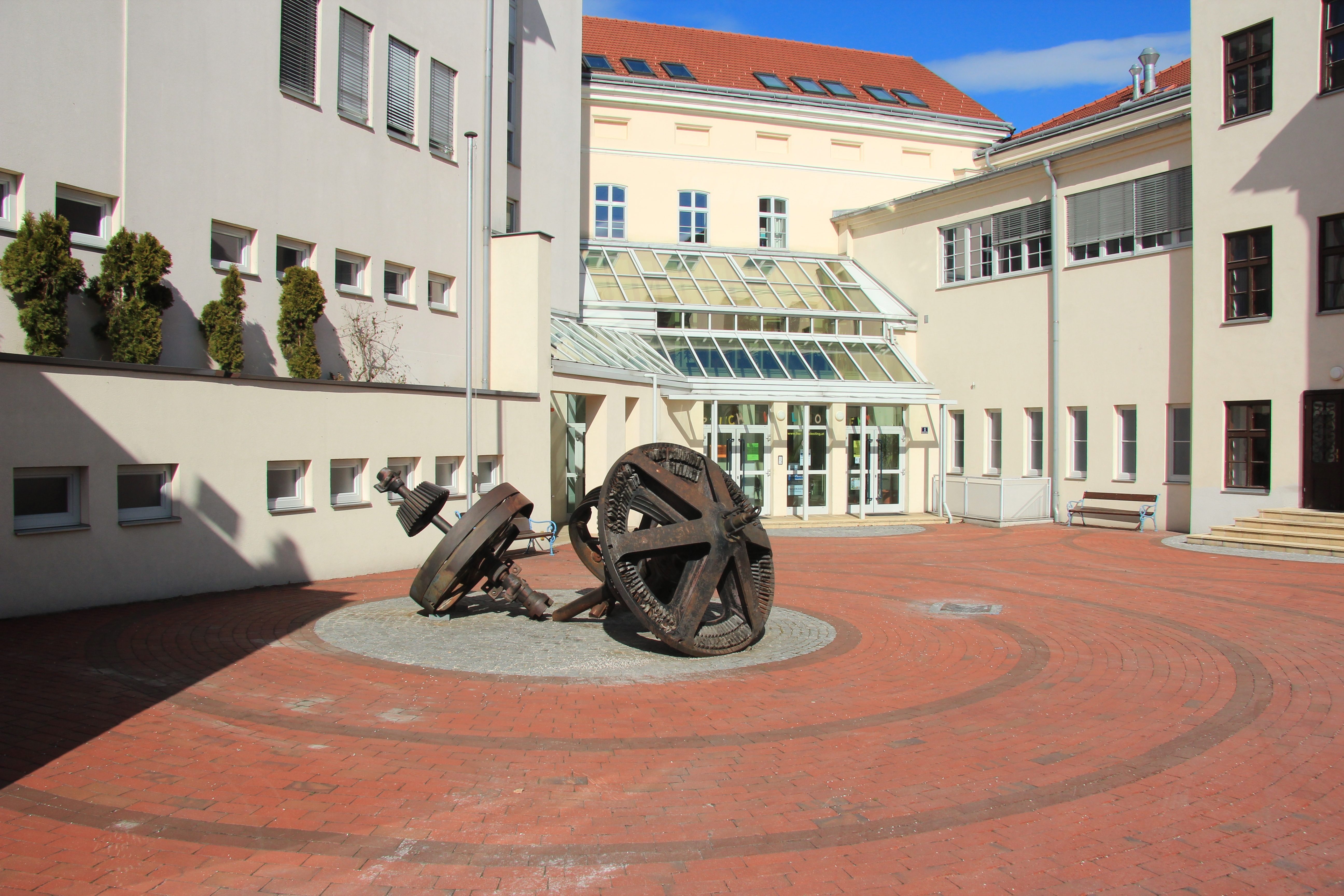 Denkmal vor der Hauptschule in der ehemaligen Seisermühle in Markt Piesting, Niederösterreich